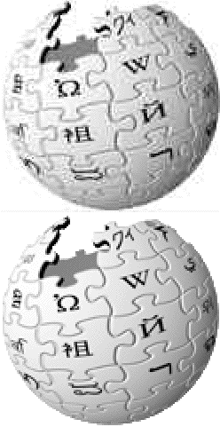 The example of compression artifacts used in the JPEG algorithm contributed by User:Jclin